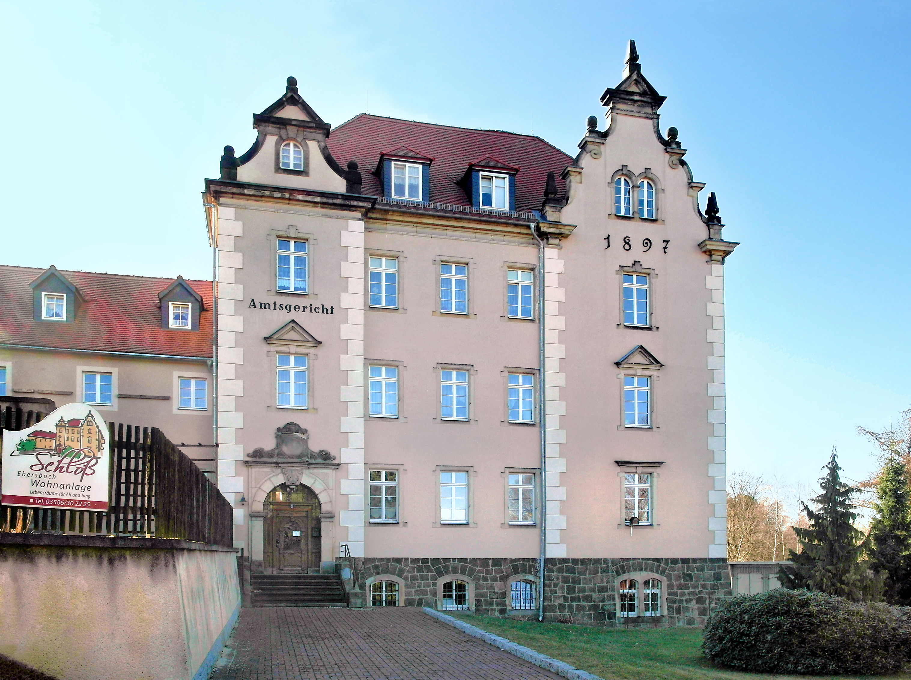 27.03.2017 02730 Ebersbach-Neugersdorf, Schloßstraße 6: Herrenhaus Ebersbach. Nach einem Brand entstand 1909 der heutige Bau auf dem einstigen Vorwerk Ebersbach. Bis 1952 diente das auch als Schloß bezeichnete Gebäude als Amtsgericht, danach als Schule, Kindergarten und Hort sowie teilweise als Wohnhaus. Die Schule wurde 1998 geschlossen Heute „Schloß Ebersbach Wohnanlage“. Hauptfassade, Sicht von Osten. [SAM9031.JPG]20170327500DR.JPG(c)Blobelt